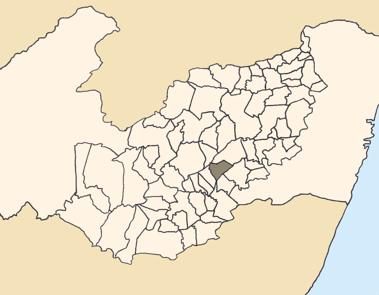 Mapa da mesorregião Agreste de Pernambuco (Brasil) subdivida em municípios. Em destaque, o município de Ibirajuba. Map of the brazilian state of Pernambuco (mesorregião Agreste) showing the city of Ibirajuba. Imagem tratada com o GIMP. Image made with GIMP.